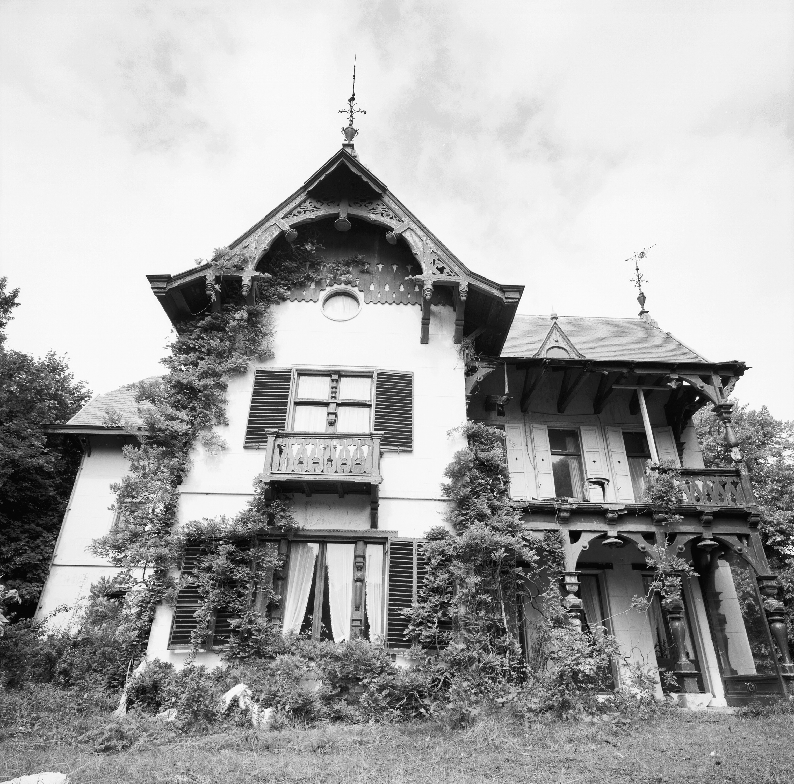 Exterieur VOORGEVEL